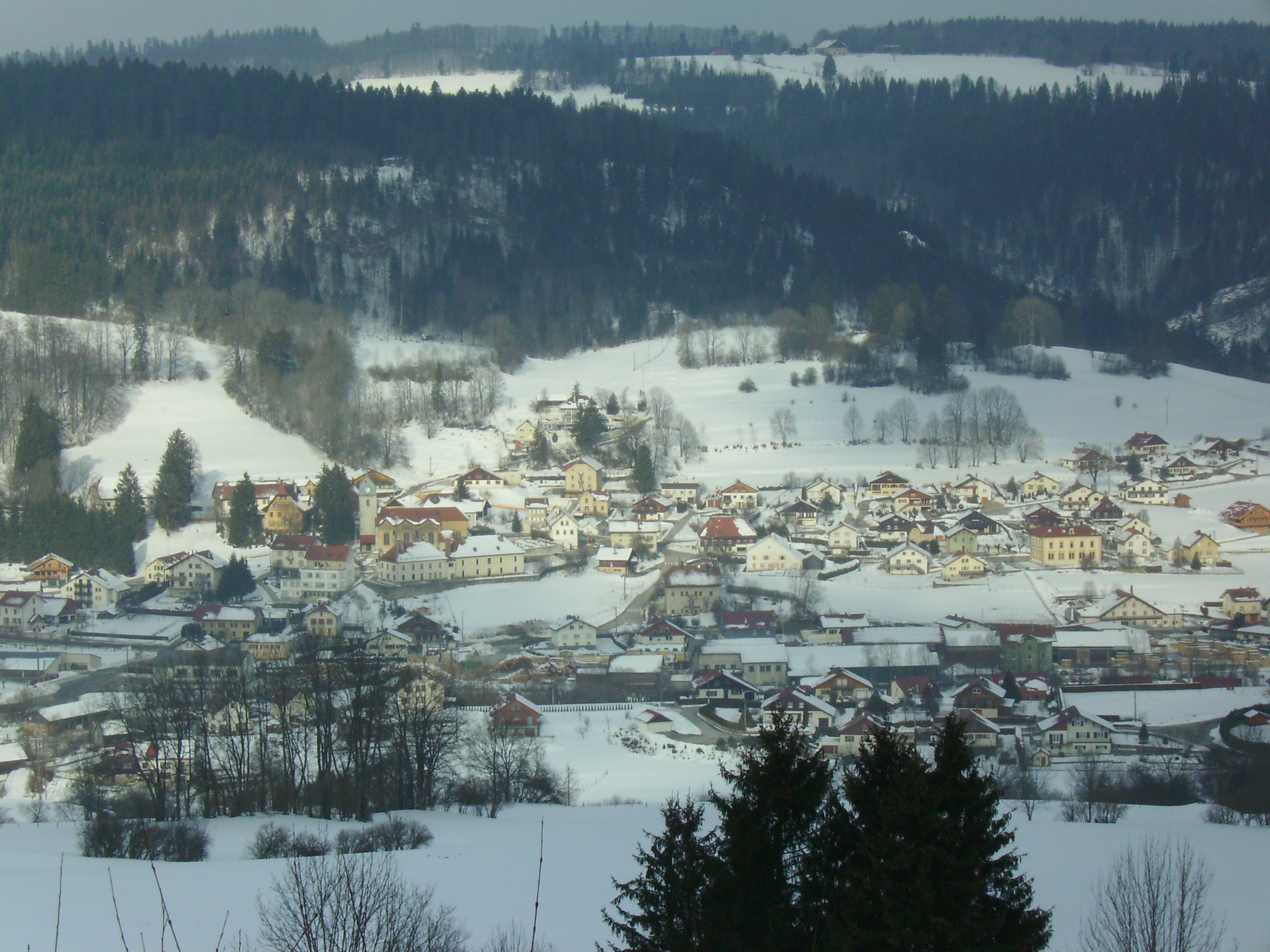 Vue de Grand Combe Chateleu